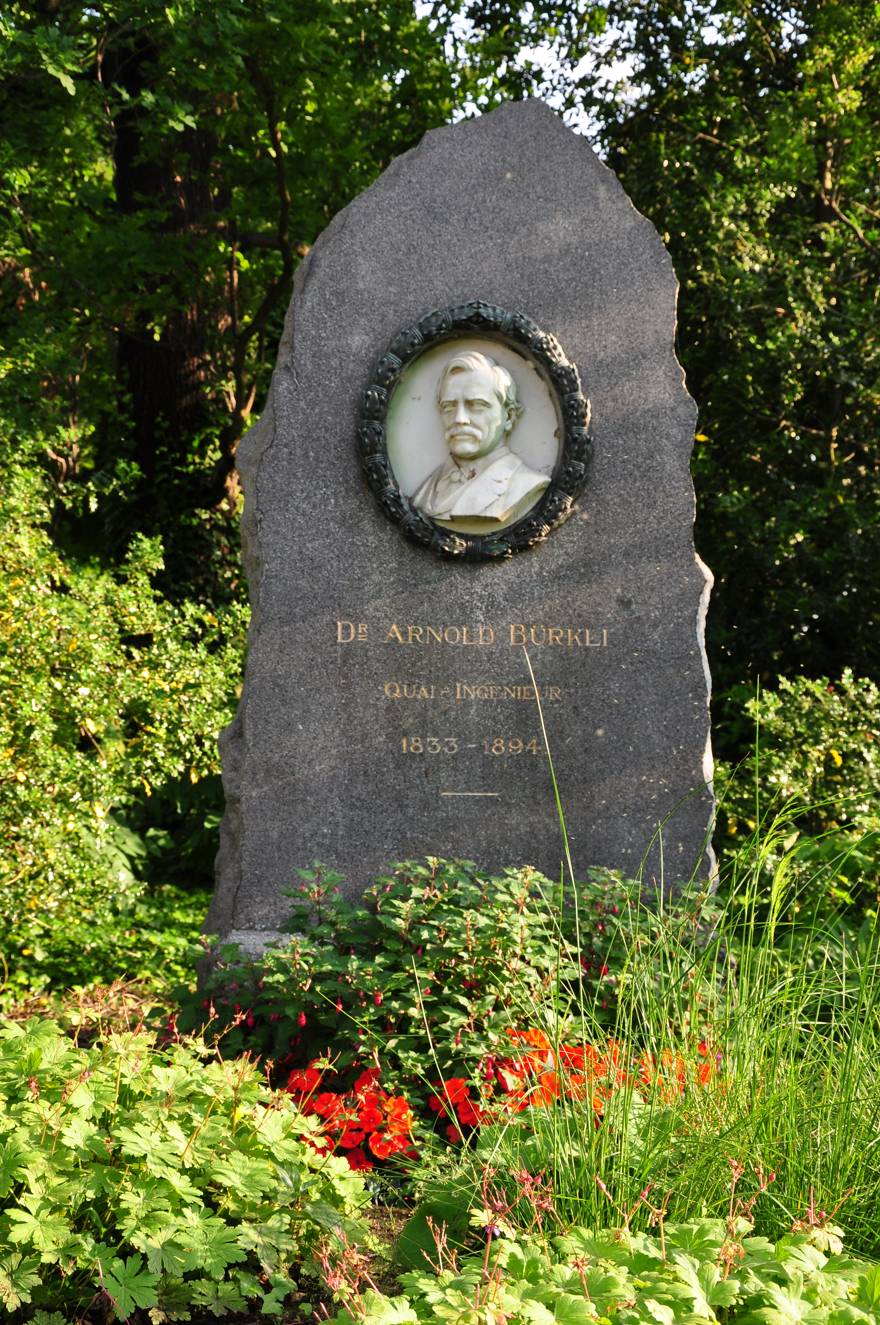 Arnold Bürkli memorial at Arboretum in Zürich-Enge (Switzerland)